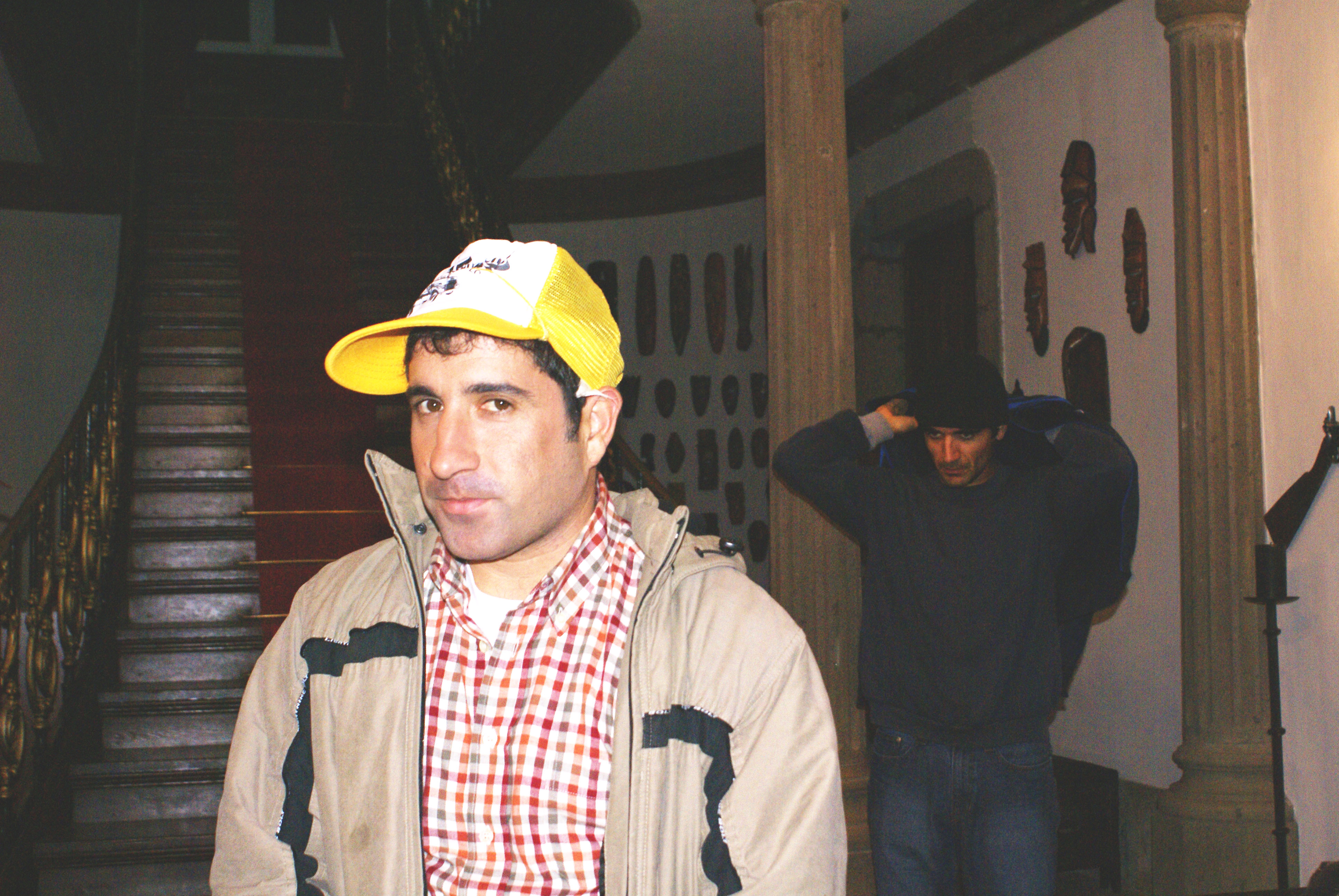 Fala Quem Sabe, episódio A casa assombrada, Filmado na Villa Maria